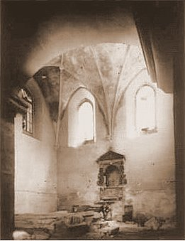 Golden Rose Rynagogue, Lviv